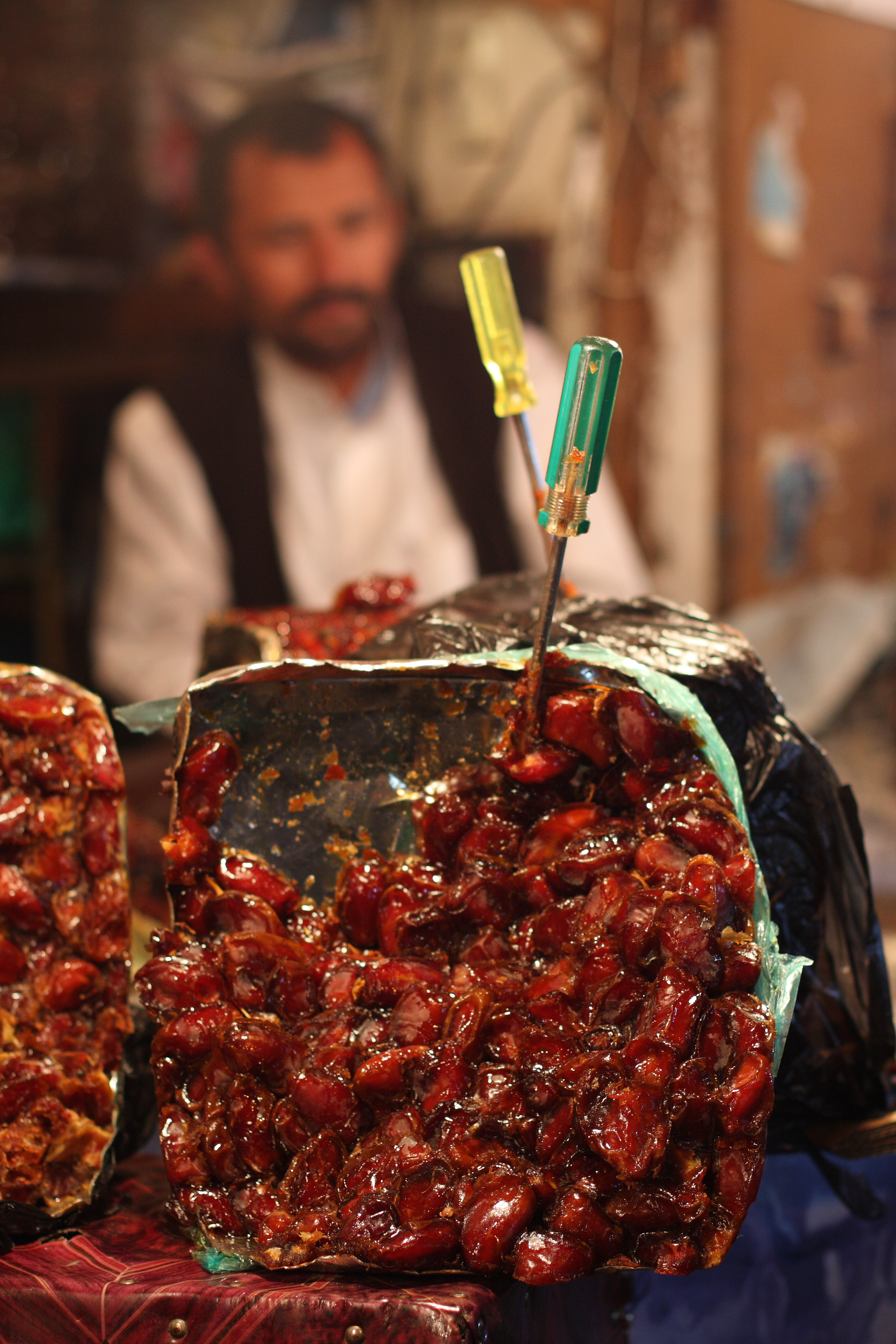 Souk Al Milh, Sana, Yemen